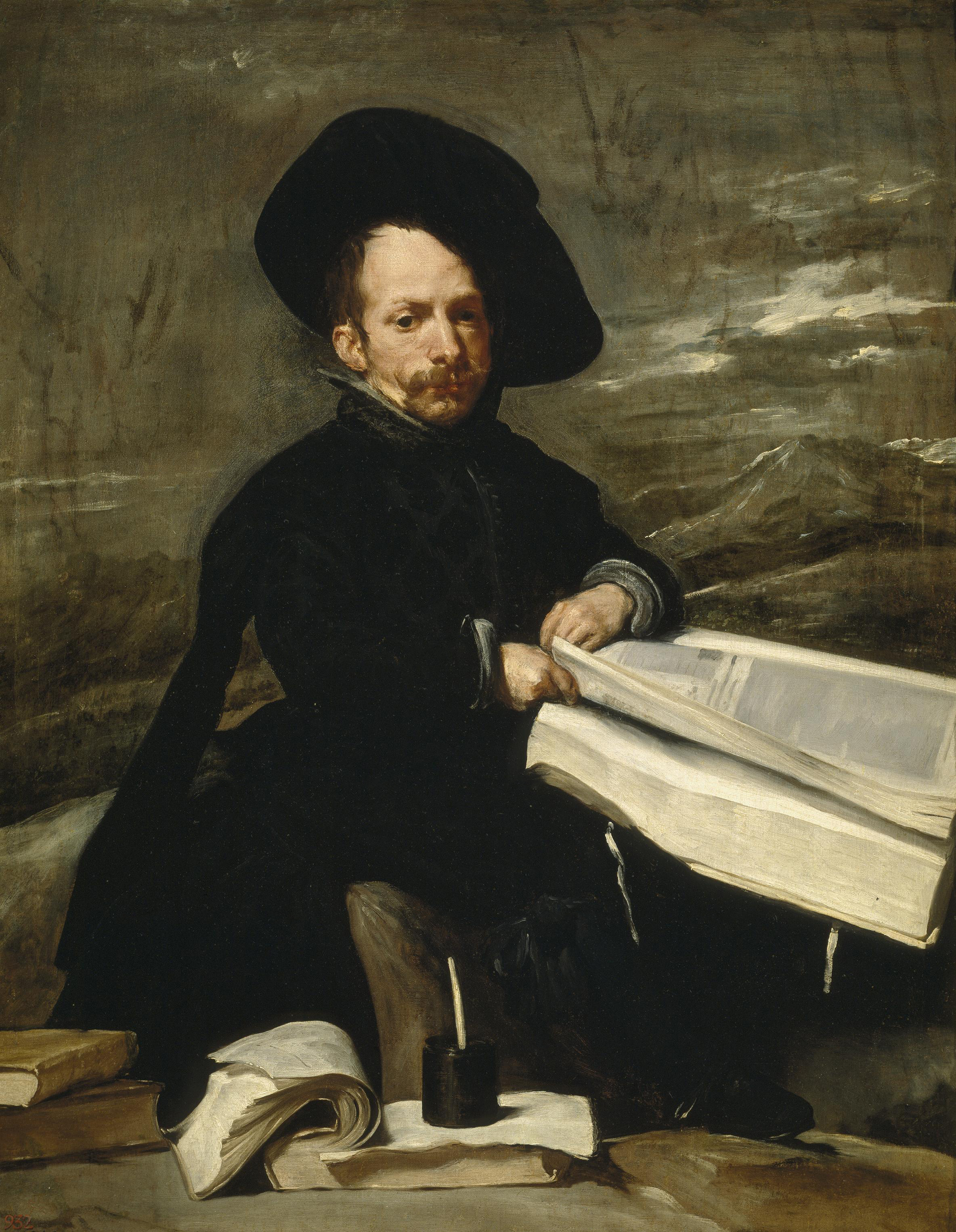 Supuesto retrato del bufón español Diego de Alcedo, que según consta en la documentación de la época estuvo al servicio de la Corte española entre 1635 y 1660.